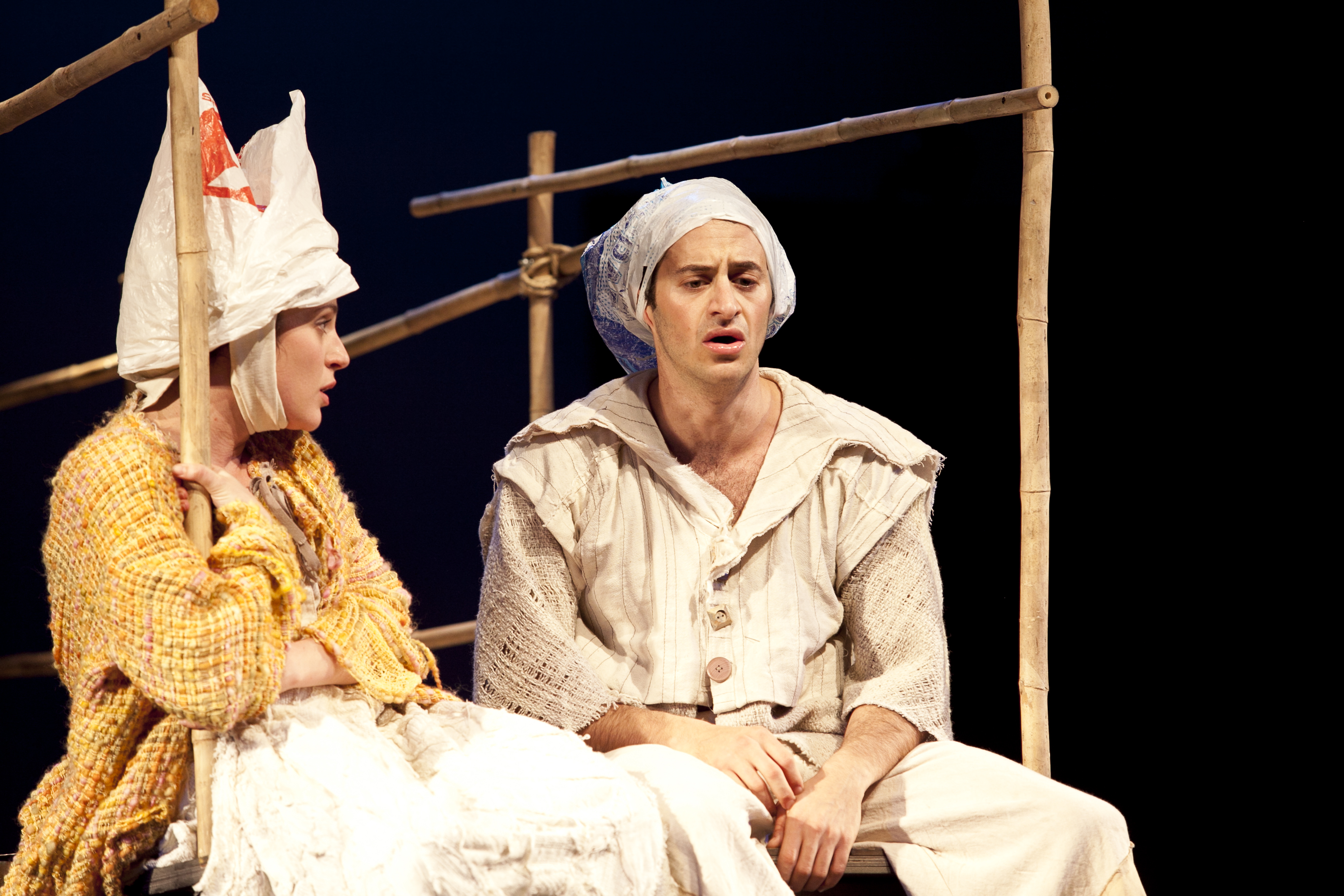 אורי יניב בהצגה בתיאטרון גשר